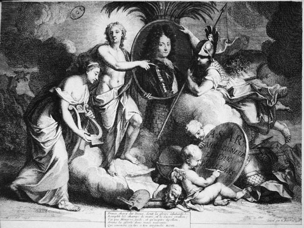 Fontispice